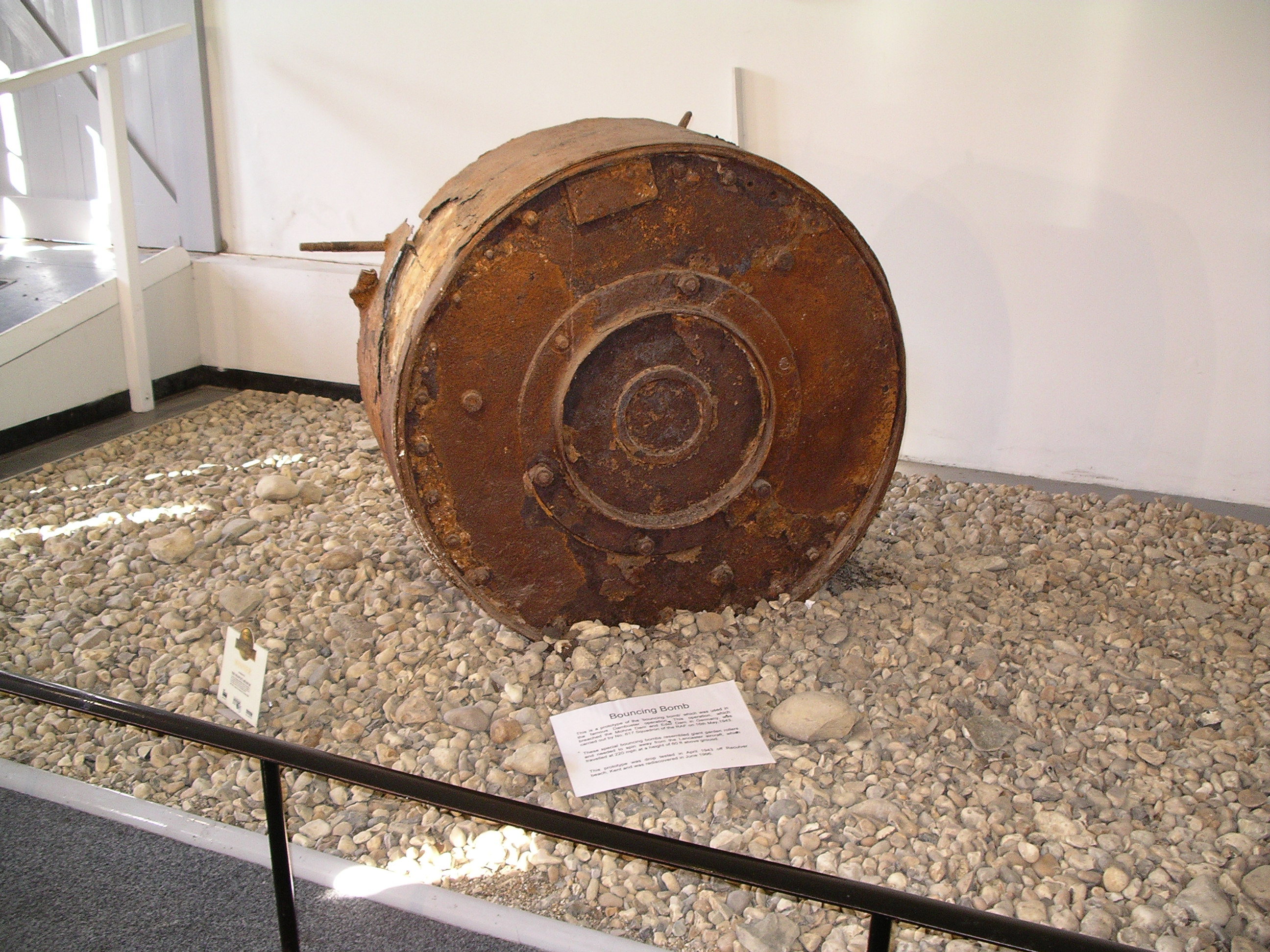 Rotationsbombe, Auf Dover Castle ausgestellte Bombe